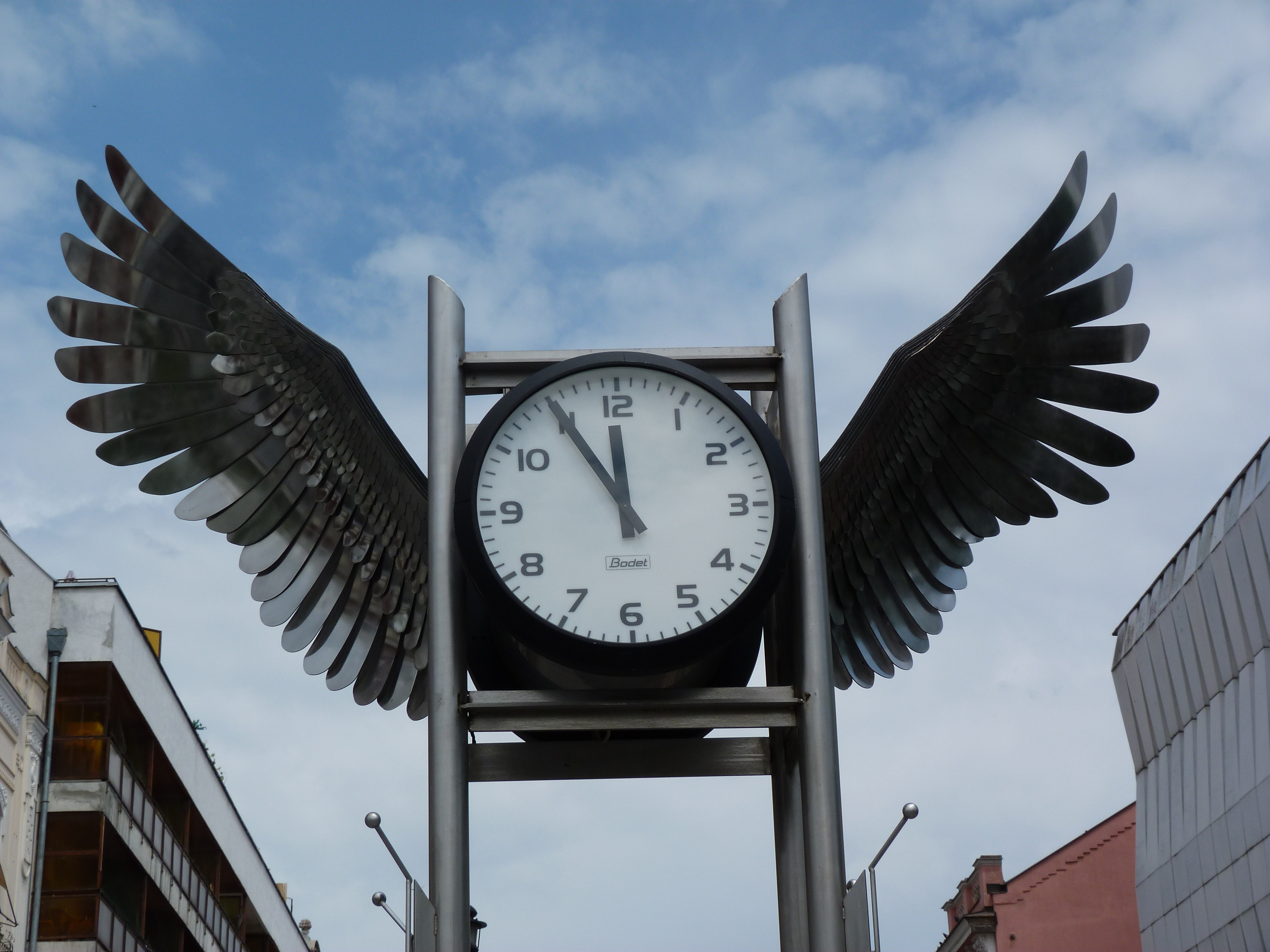 A felvétel 2013. Május 17 –én pénteken készült Nyíregyházán. ©© Derzsi Elekes Andor, Budapest, 2013, A kép és filmfelvételek egészben, vagy részletekben másolását, bármilyen úton történő sokszorosítását és felhasználását a szerző ellenérték nélkül, jogutódjaira is kihatóan megengedi. Az engedély kiterjed a kereskedelmi célú hasznosításra is. Kéri azonban nevének feltüntetését a felhasználás során. A Metapolisz sorozat valamennyi képe és filmje Creative Commons alatti valamint kereskedelmi - for profit - célra is felhasználható. Ajánlott hivatkozás: Derzsi Elekes Andor: Metapolisz DVD line